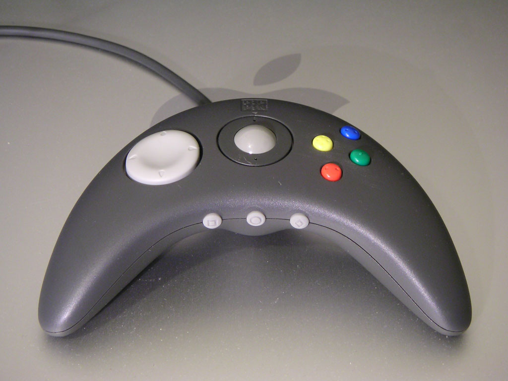 Apple Pippin paddle